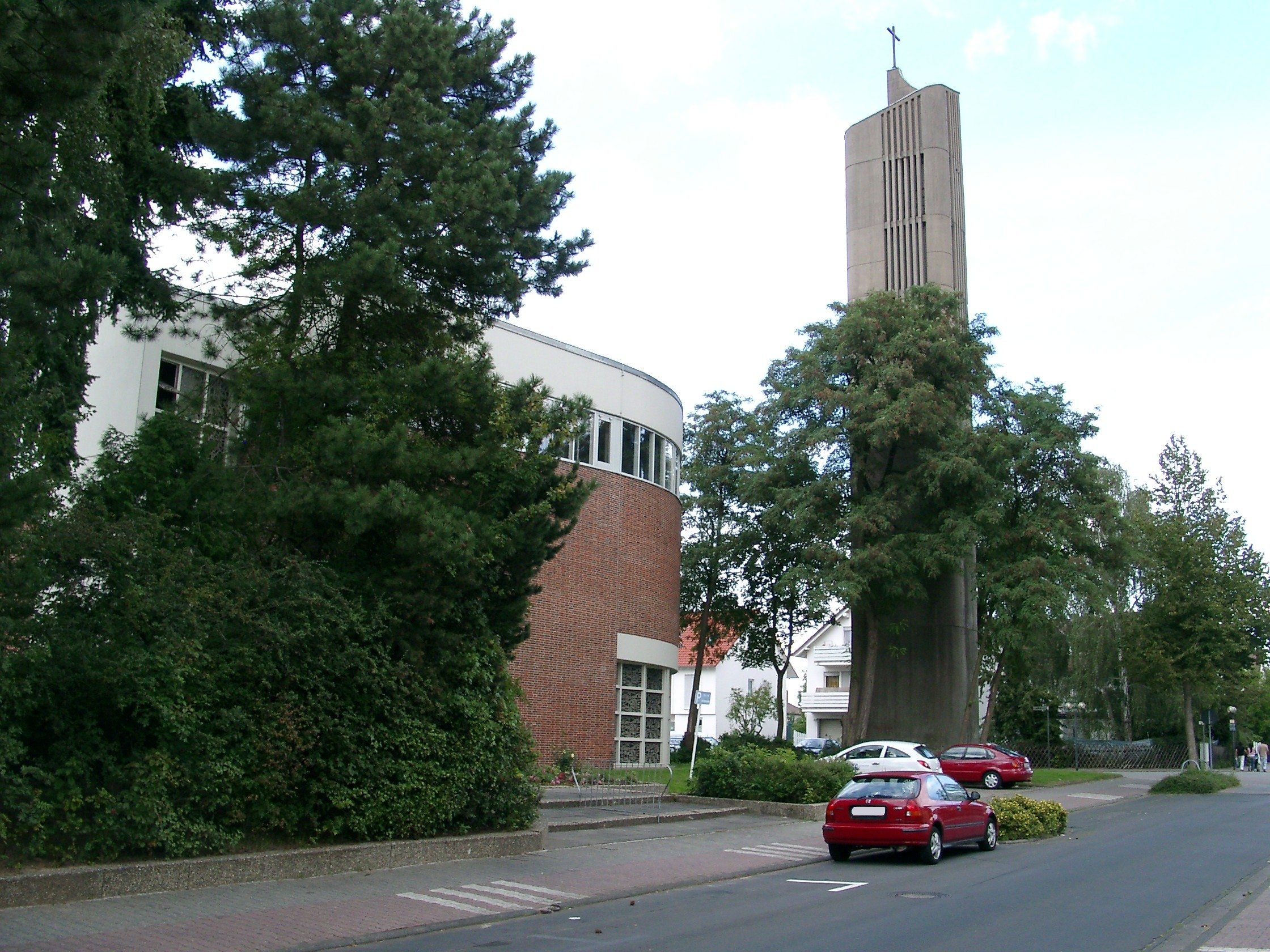 Kathol. Pfarrkirche St. Stephan in Dreieich Sprendlingen